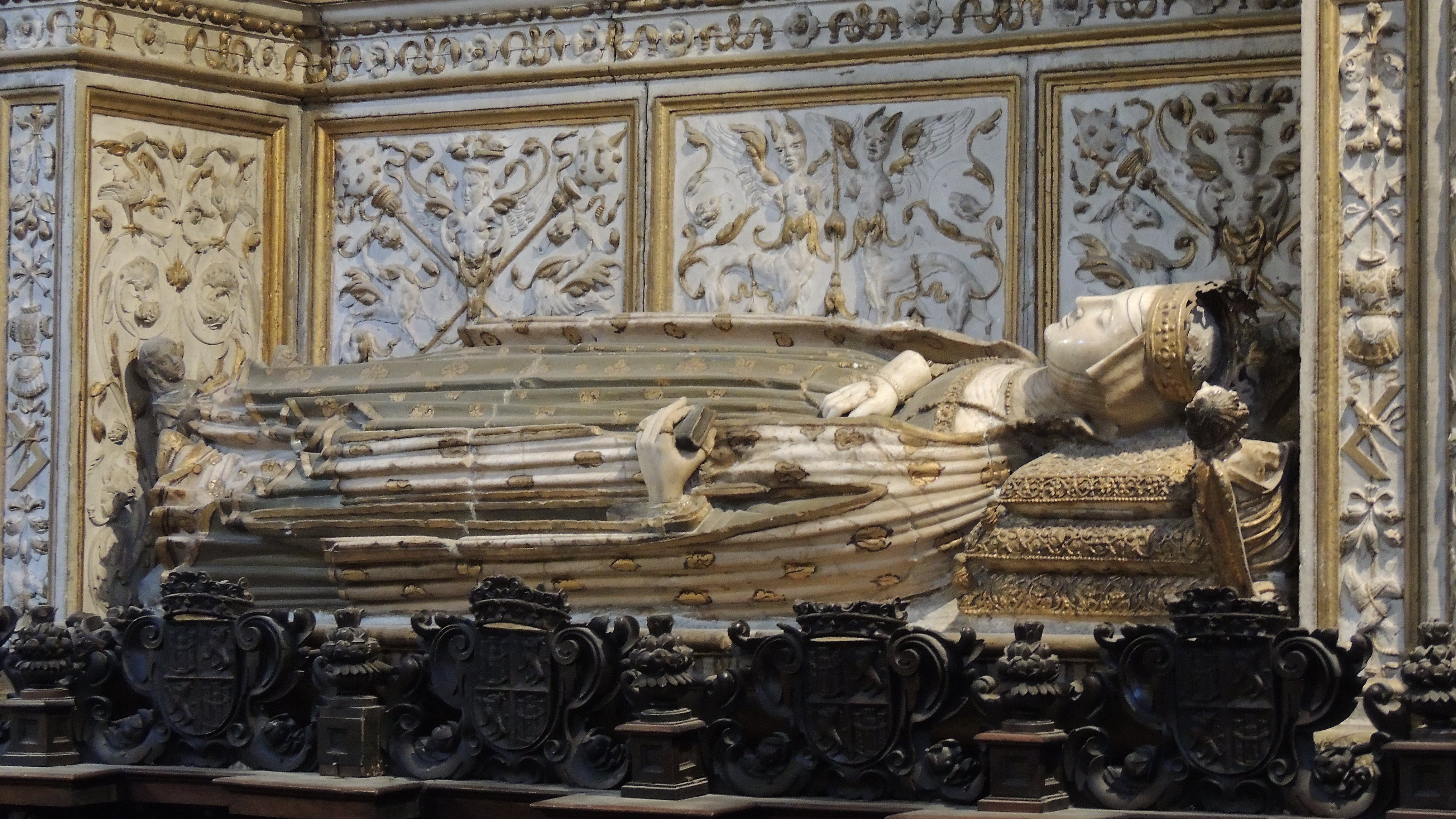 Sepulcro de la reina Juana Manuel de Villena (1339-1381), que fue hija del célebre magnate y escritor Don Juan Manuel y esposa del rey Enrique II de Castilla. Se encuentra en la capilla de los Reyes Nuevos de la catedral de Toledo.